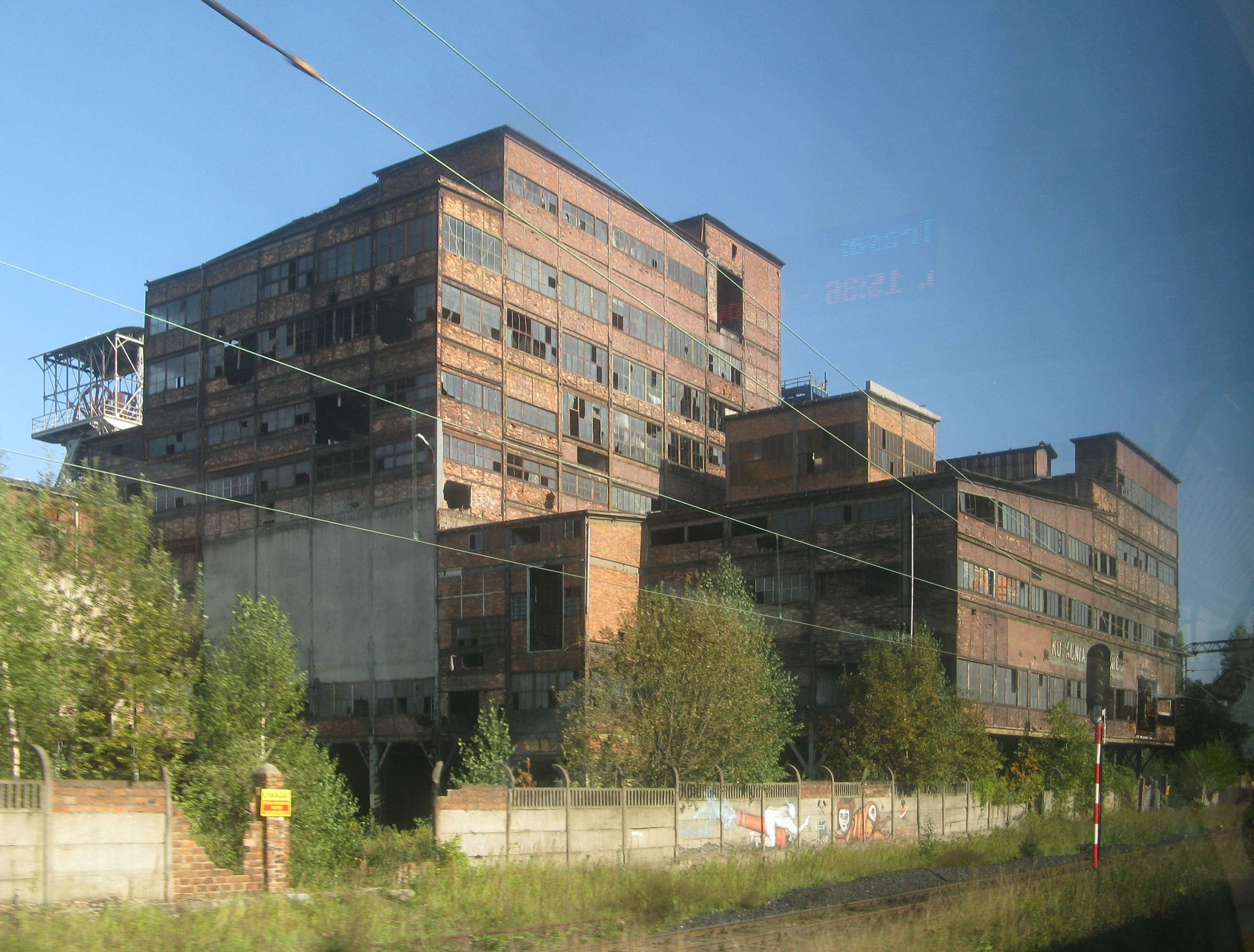 zakład przeróbki kopalni węgla kamiennego Mysłowice, z lewej wieża szybu Łokietek, widok z pociągu jadącego w kierunku Katowic